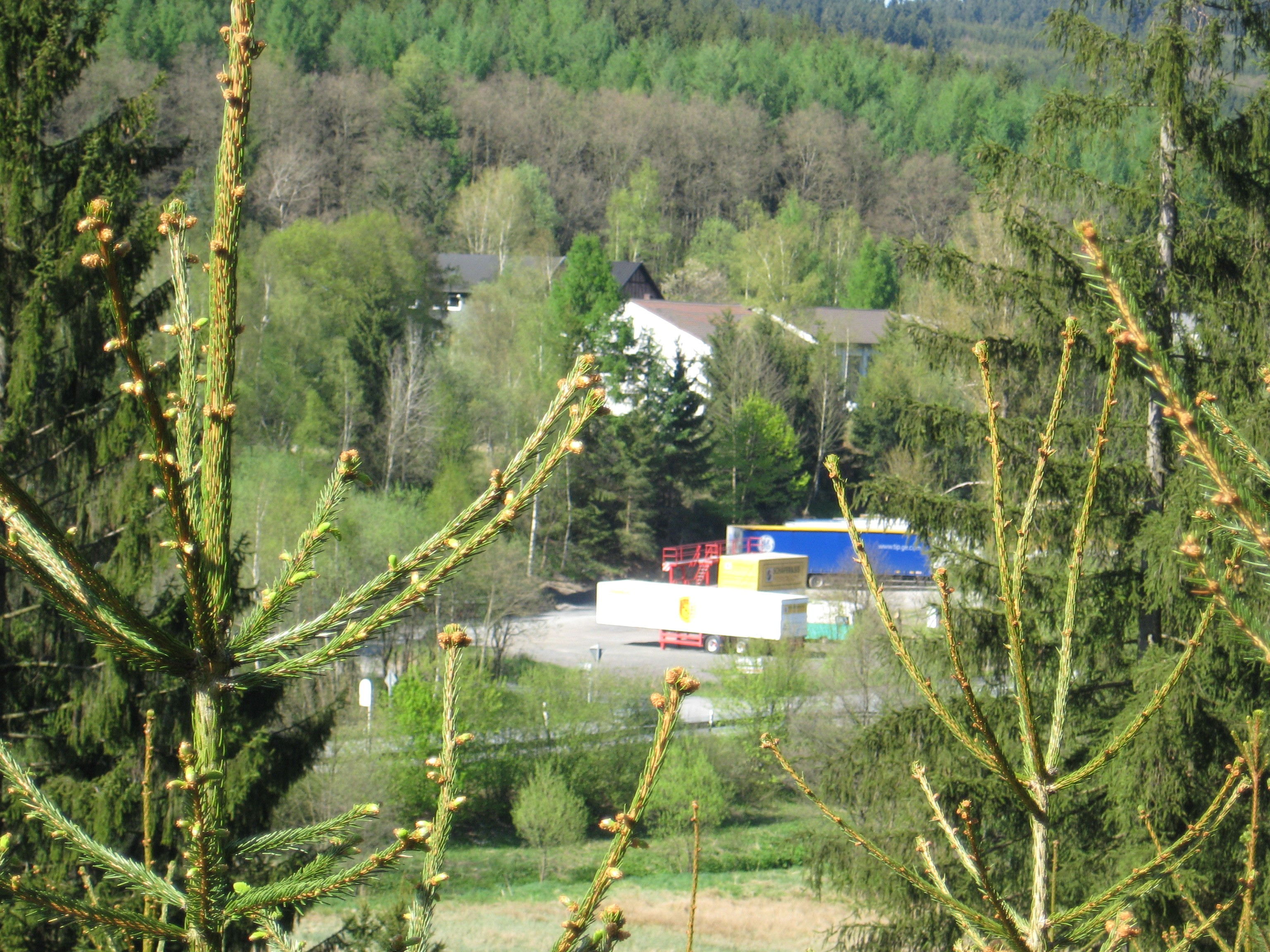 Gelände der Grube Stahlseifen / Ground of Stahlseifen mine